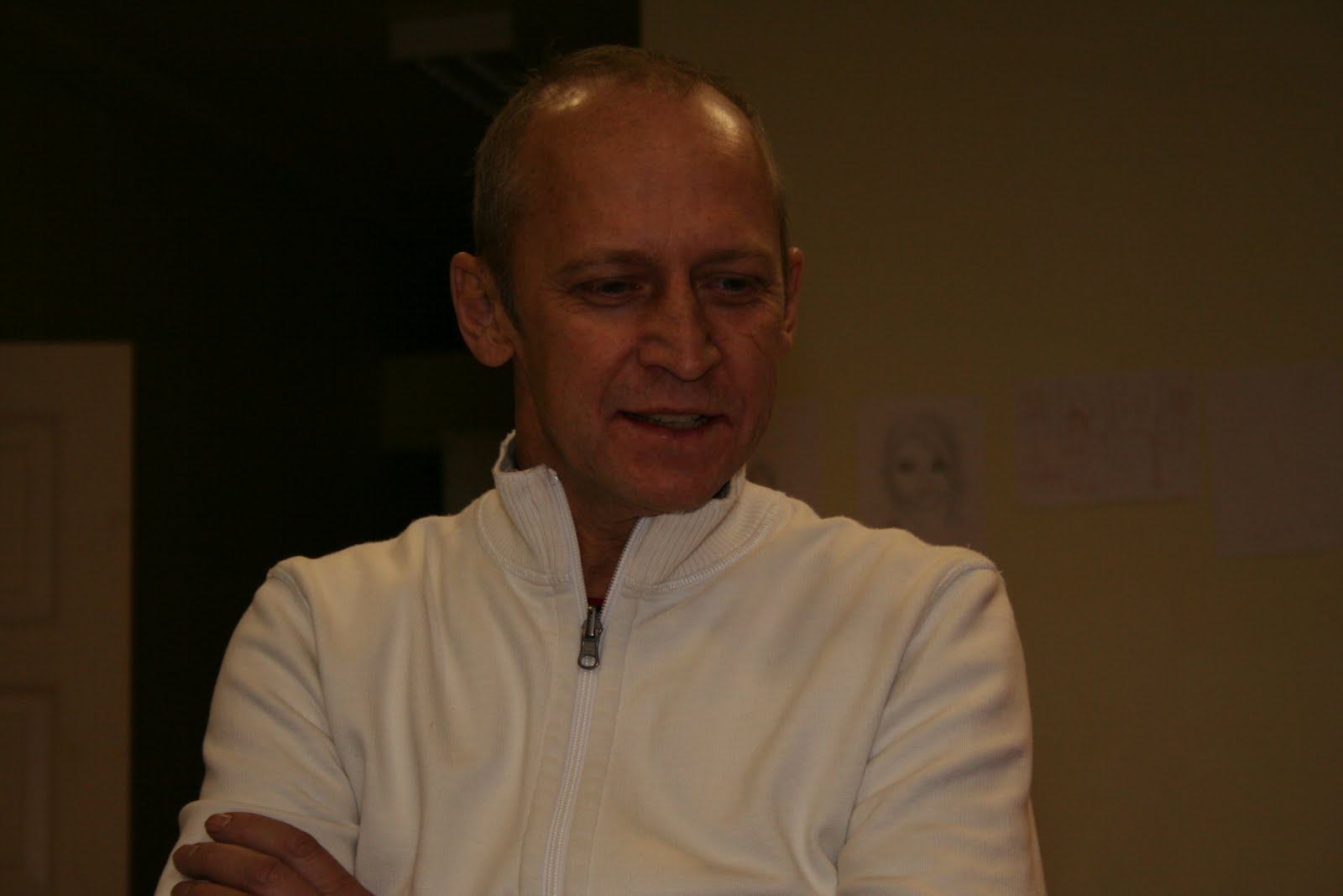 Vahur Kersna Contra sünnipäeval Urvastes 22. märtsil 2012.